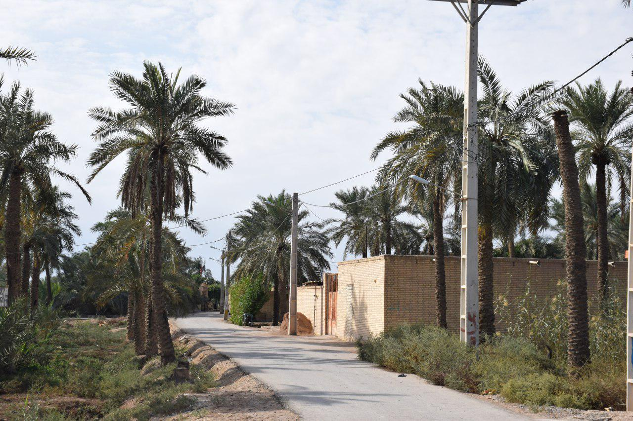 روستا امام حسن عسگری